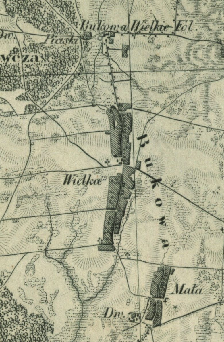 Bukowa Wielka i Mała na Topograficznej Karcie Królestwa Polskiego (Mapa Kwatermistrzostwa) z 1843 r.